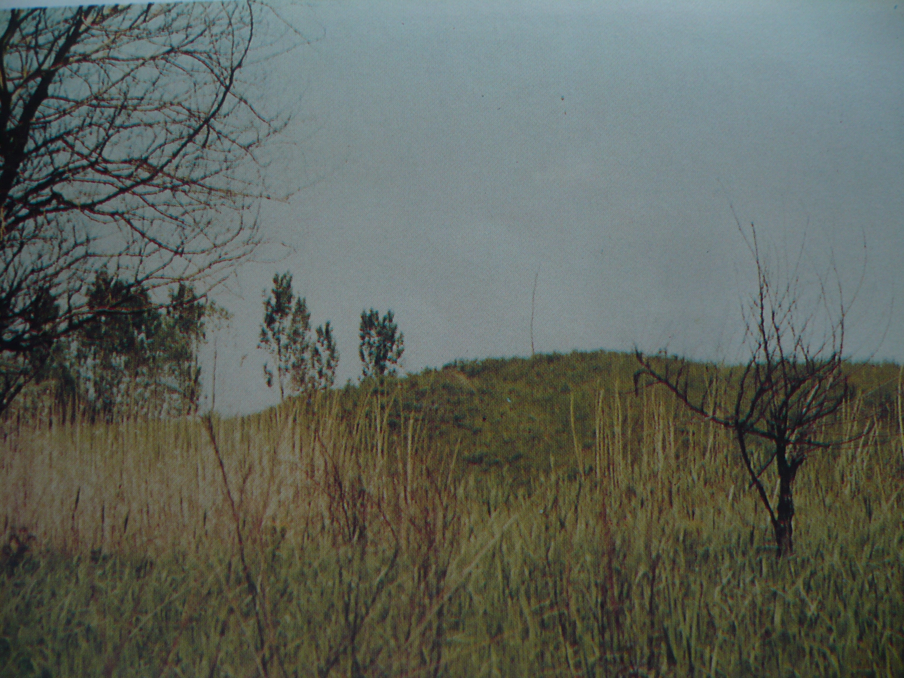 Békavár romjai, Küllőd (Szerbia)